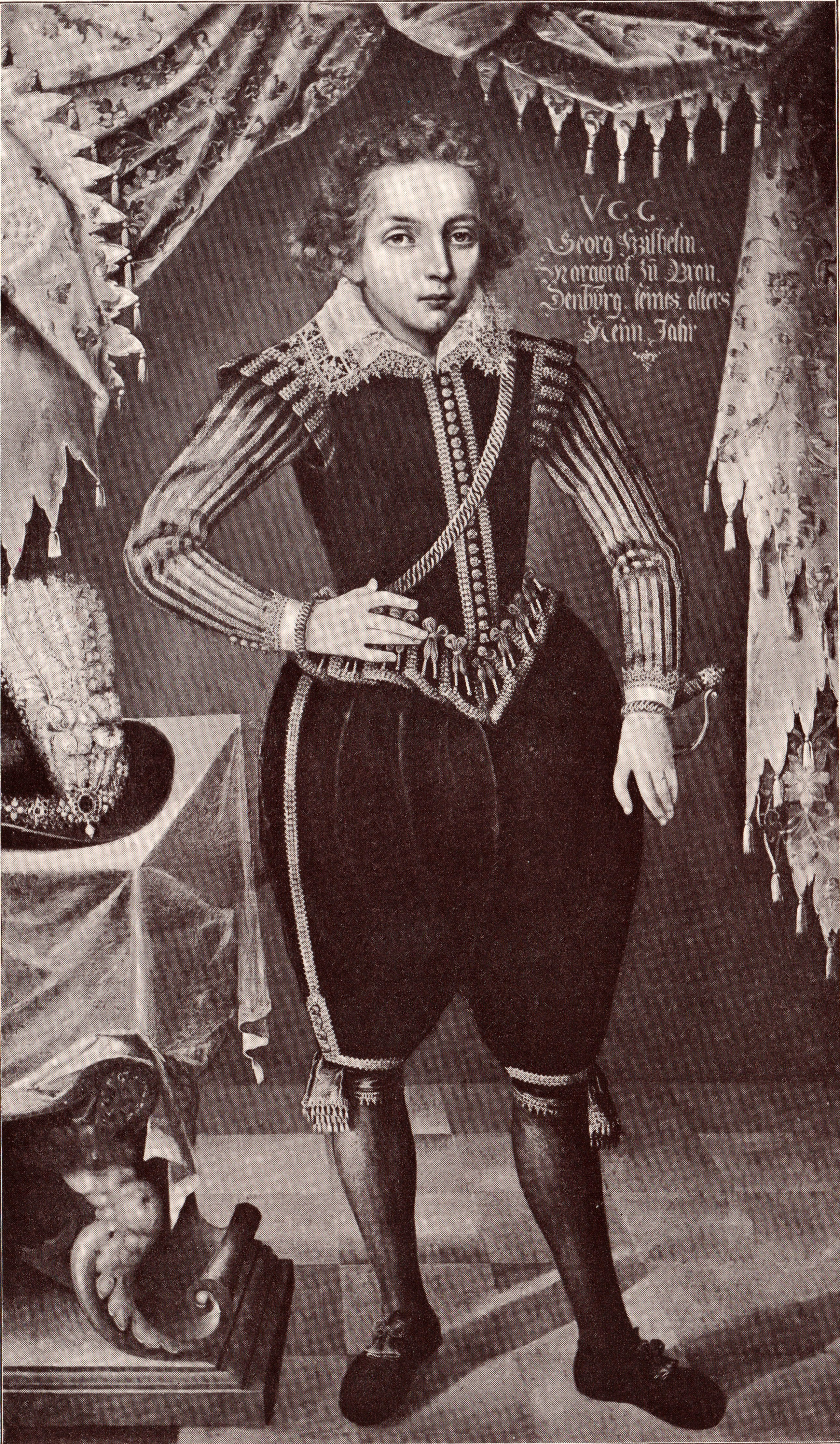 Ölgemälde von Kurprinz Georg Wilhelm von Brandenburg im Alter von 9 Jahren.